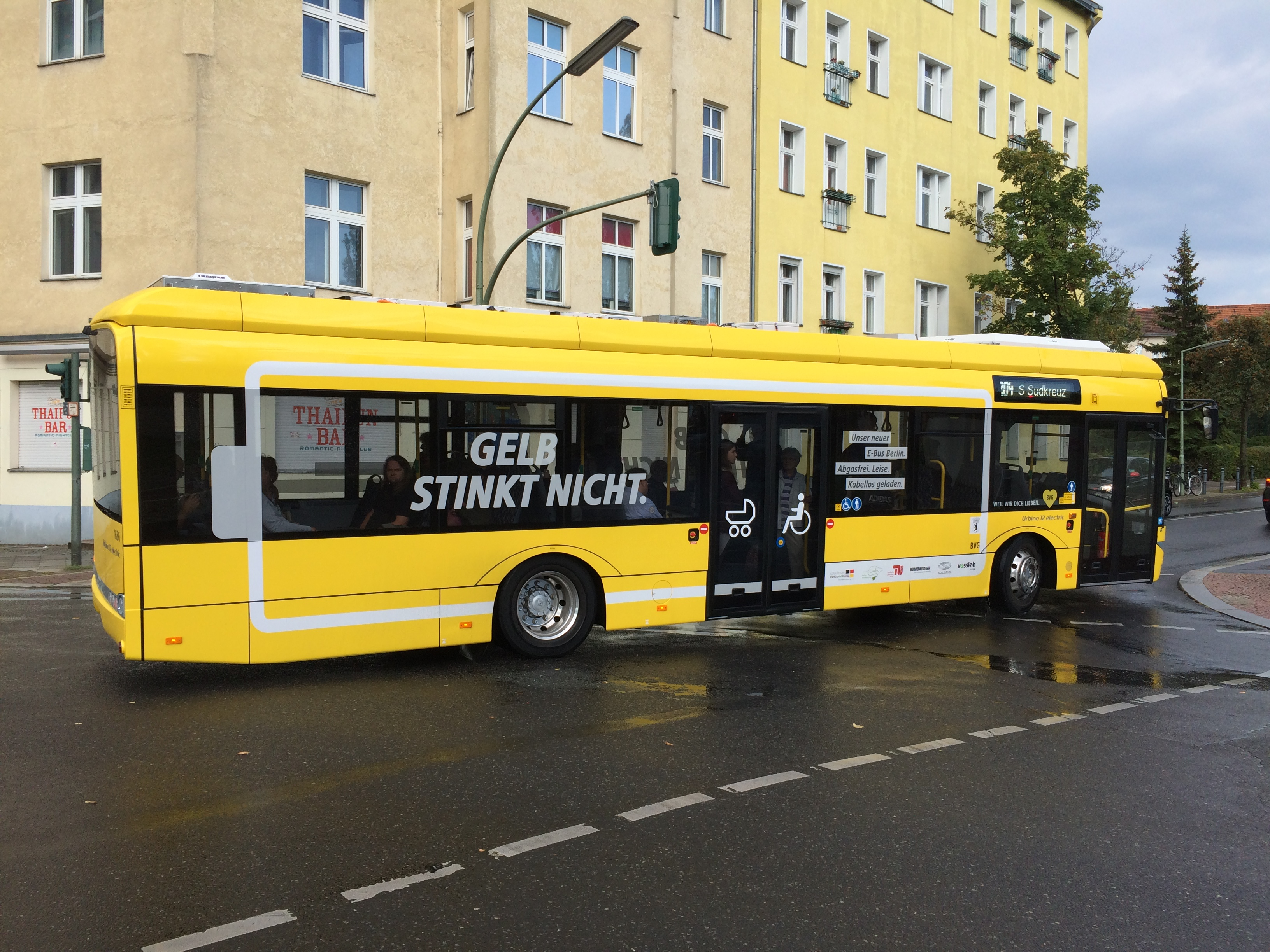 BVG-Bus der Linie 204, Solaris-Urbino 12 electric, Haltestelle Torgauer Str. (Schöneberg)